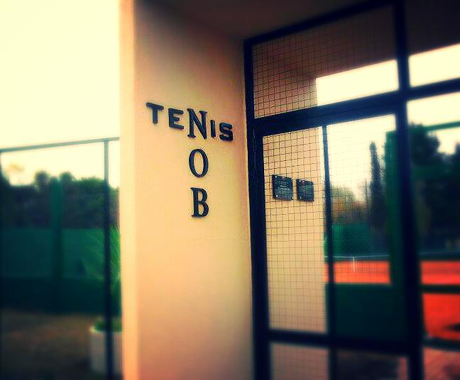 Porton Tenis NOB